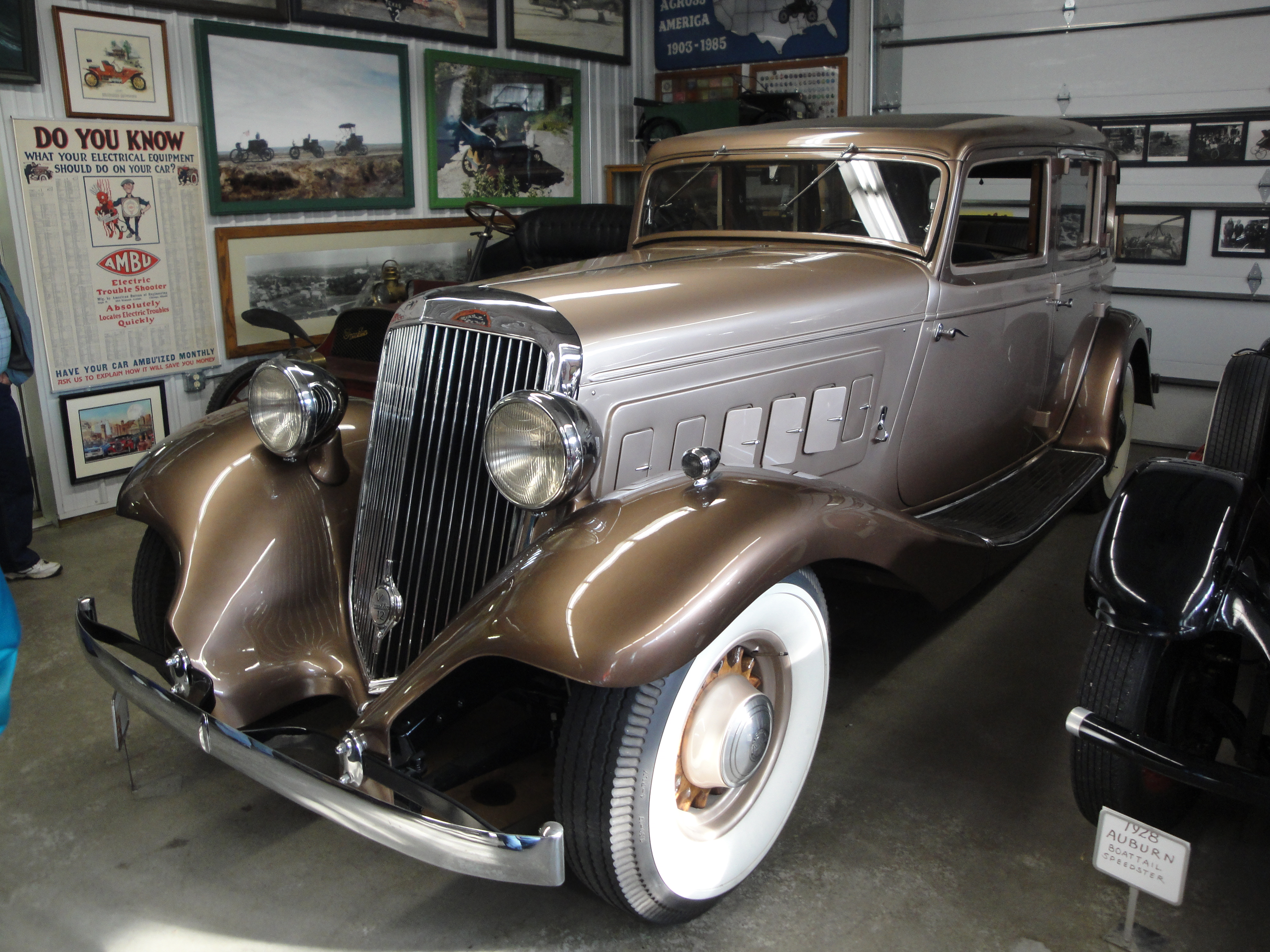 1933 Franklin Model 17 8 V-12